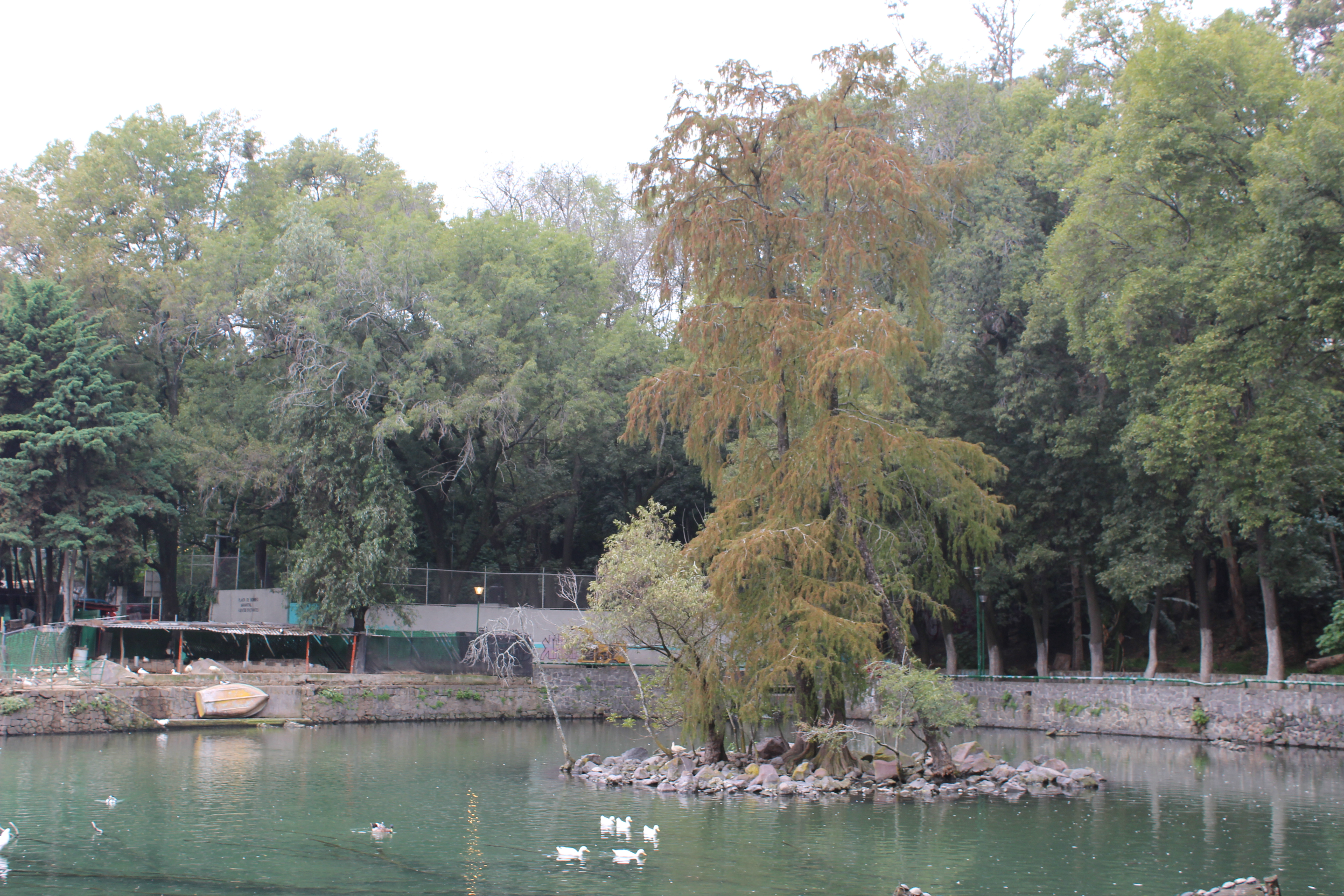 Árbol en el centro del lago del Parque Fuentes Brotantes formando una pequeña isla a su alrededor. En el lago hay patos blancos nadando. Al fondo hay una choza y una lancha volteada en la orilla.